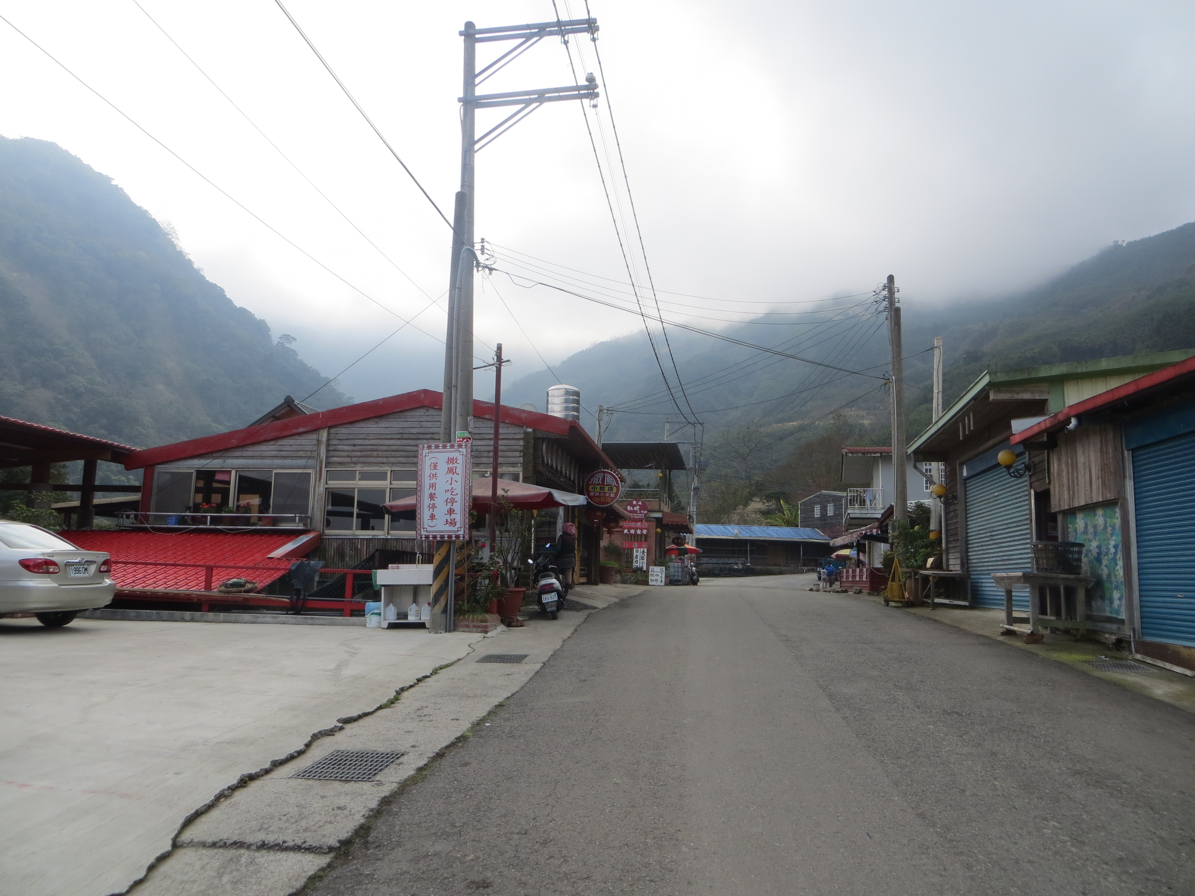 苗21鄉道終點為鹿場部落，是登加里山必經之路。2015年2月11日